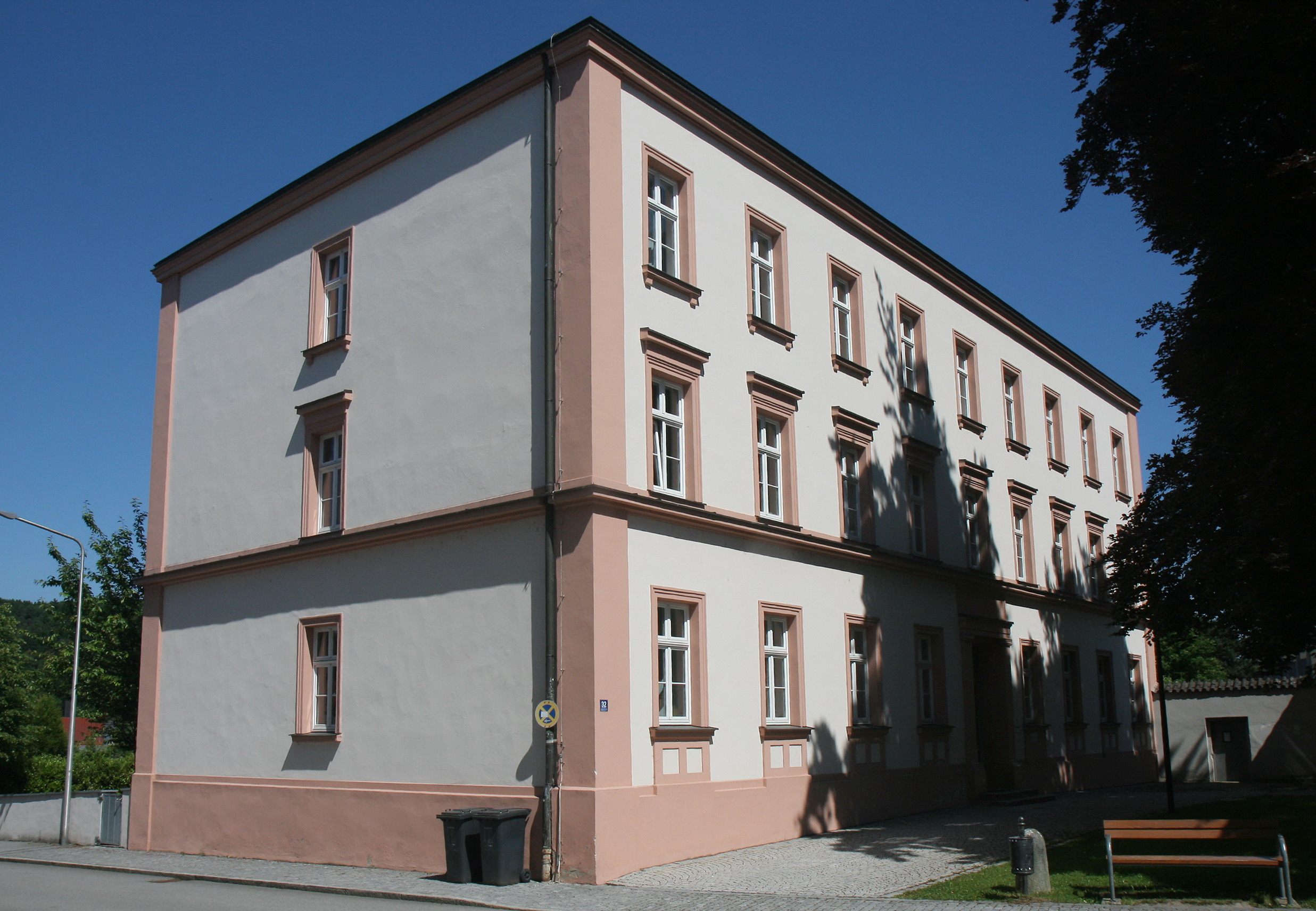 Ehemaliges Amtsgericht, jetzt Finanzamt in Vilshofen an der Donau, Kapuzinerstraße 32. This is a photograph of an architectural monument.